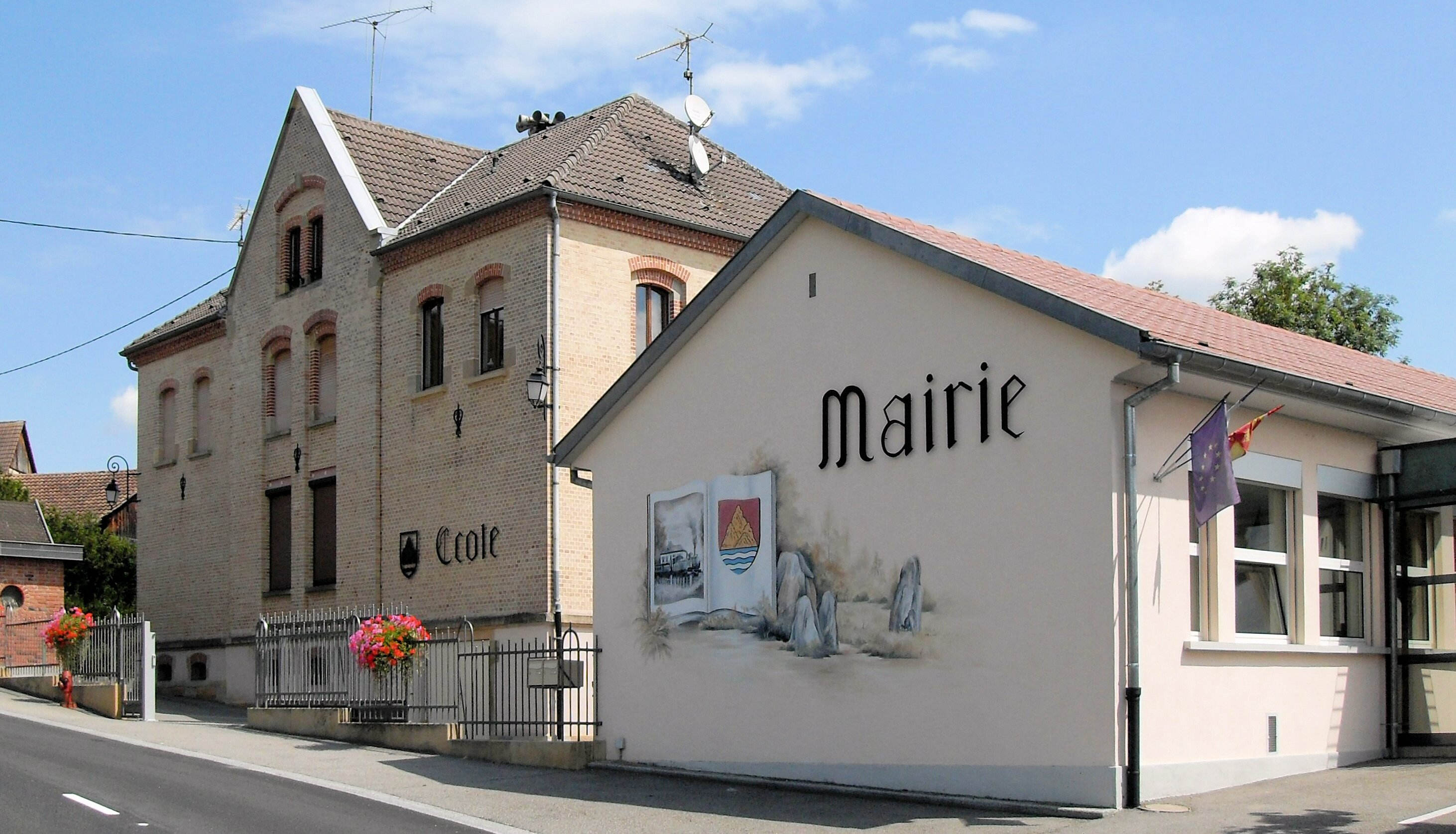 L'ècole et la mairie de Steinsoultz